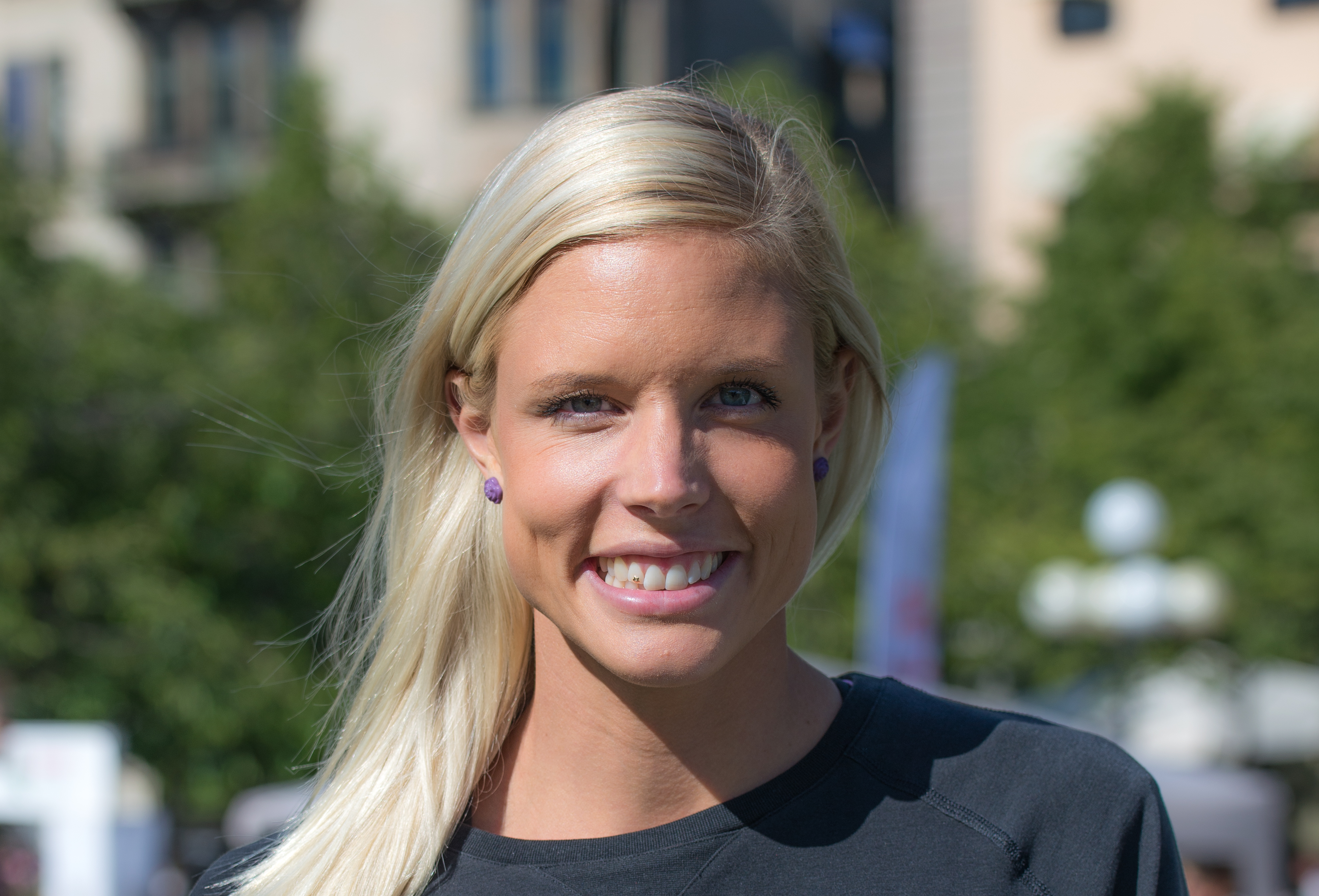 Erika Kinsey på Athletics Kids i Kungsträdgården den 13 juni 2016 inför Bauhausgalan.